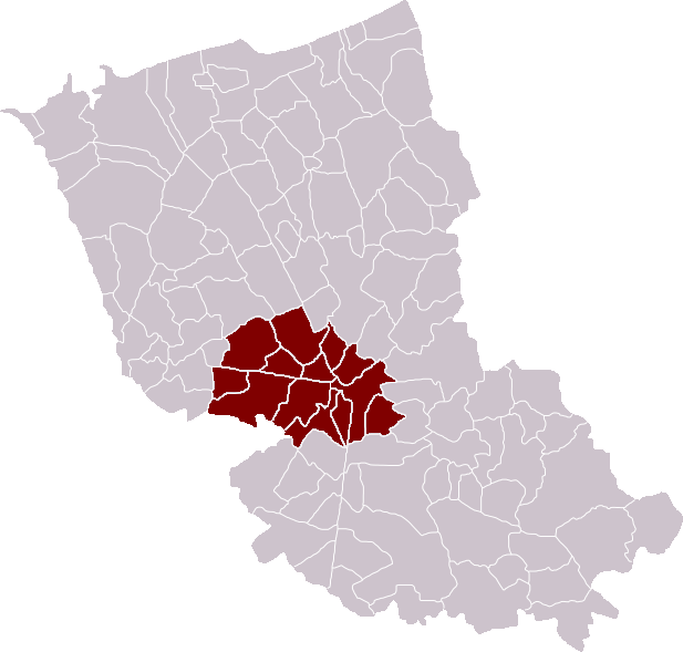 Locatie Kanton Kassel in het arrondissement Duinkerke, Frankrijk - zelfgemaakt Location Canton of Cassel in the Dunkirk district, France - self made Localisation Canton de Cassel dans l'arrondissement de Dunkerque, France - fait moi-même